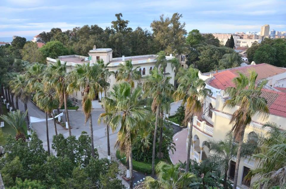 L'E.N.S.A vue d'en haut